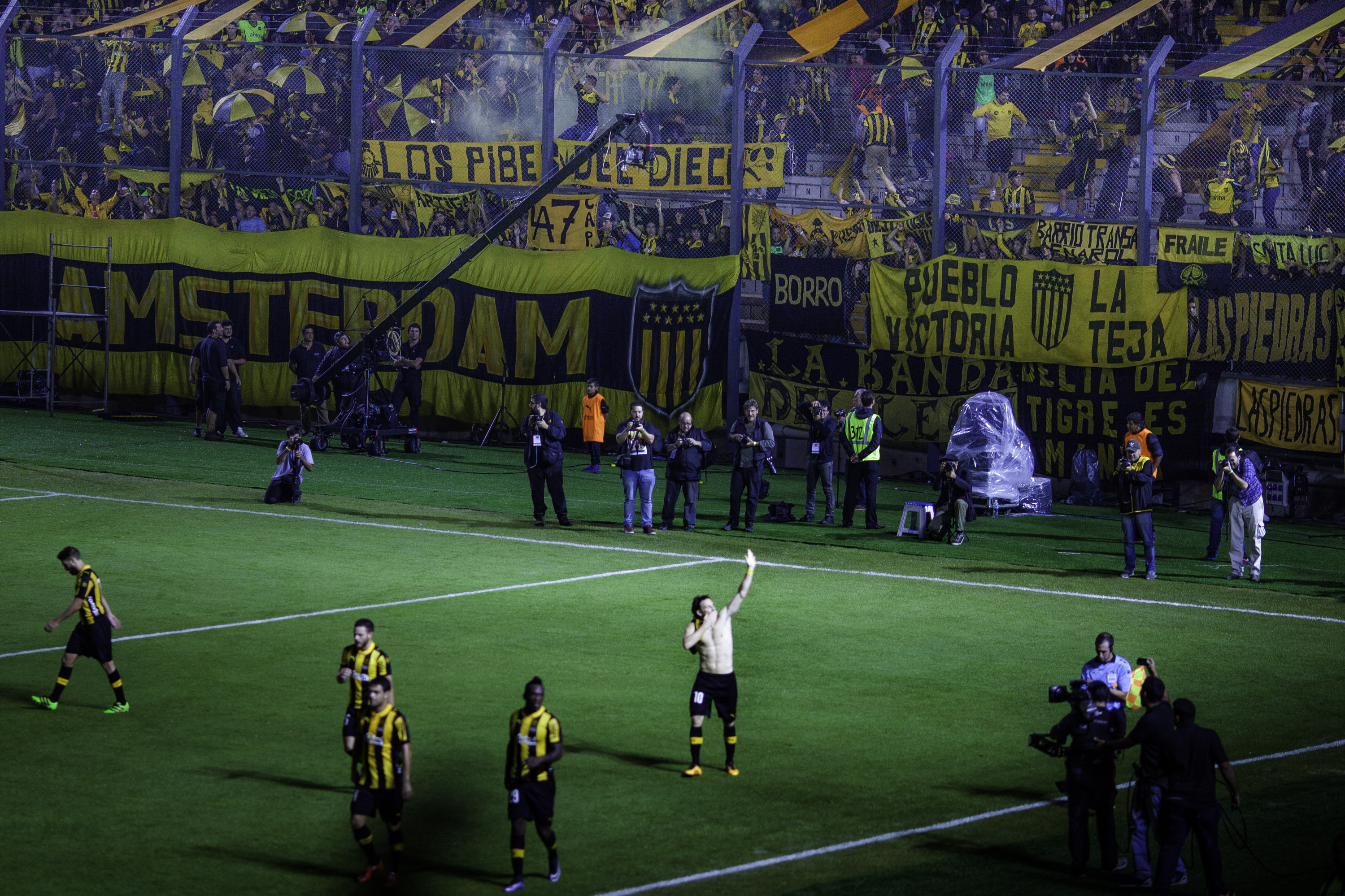 Primer gol en el Estadio Campeón del Siglo, Club Atlético Peñarol. Uruguay. Camera: Canon EOS 5D Mark II 0 ISO: 400